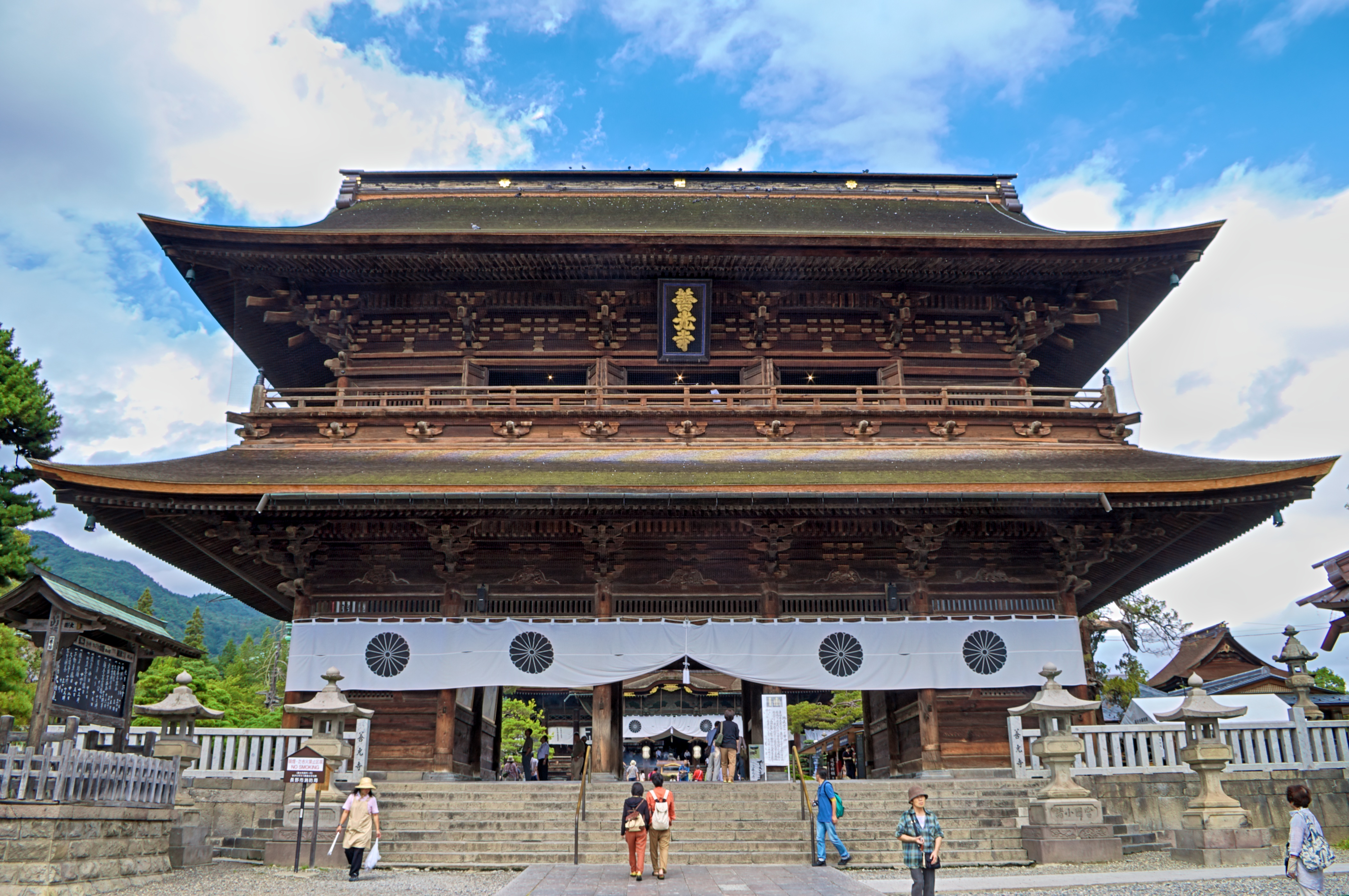 Sanmon gate of Zenko-ji in Nagano.